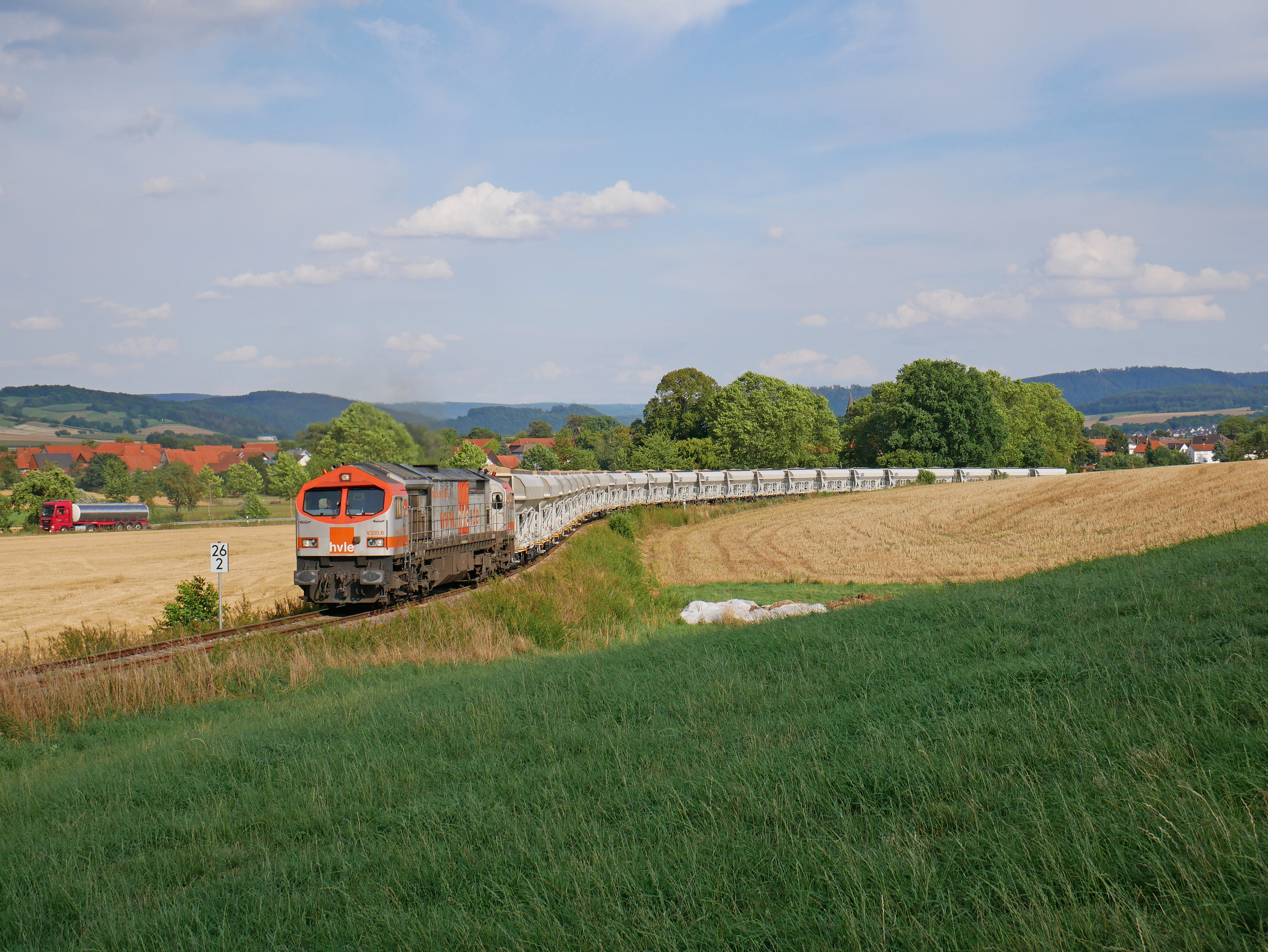 HVLE-Tiger V330.6 mit Sandhalbzug in 23 Faccns-Wagen am Ruhberg nach Grohnde